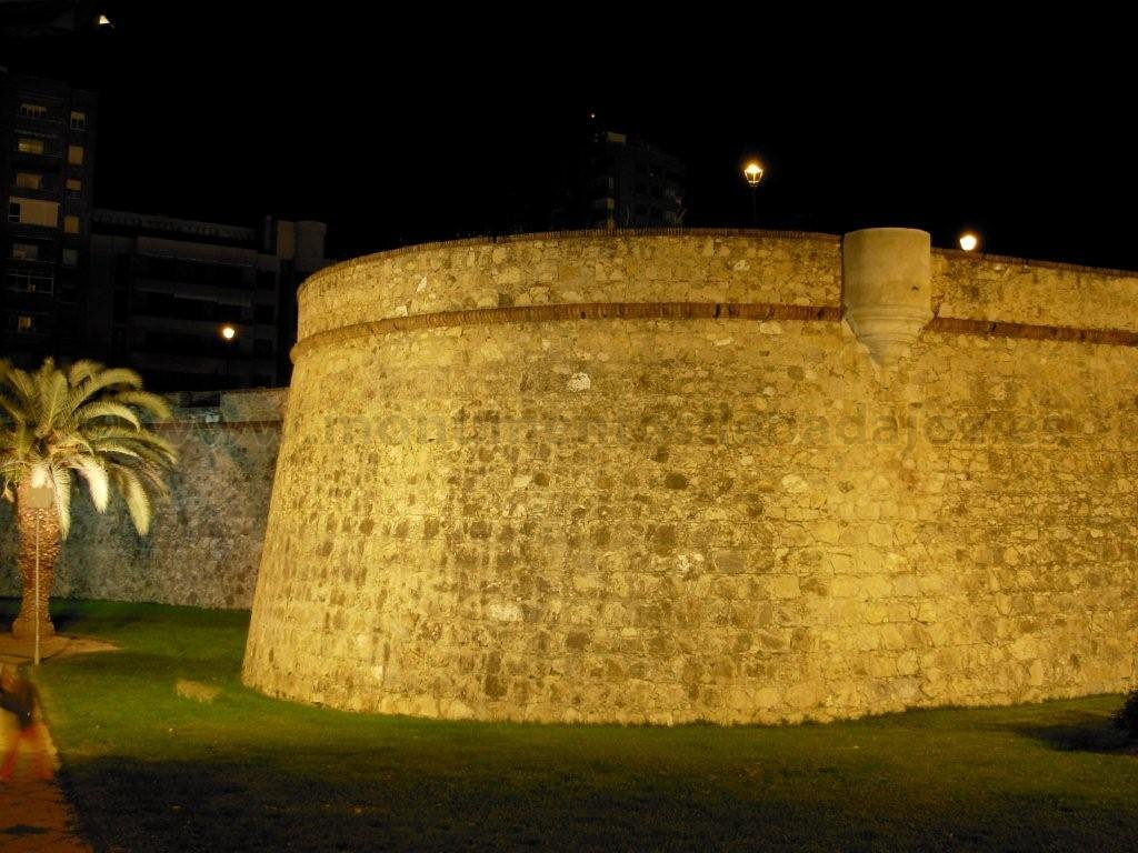 Vista nocturna del orejón en el extremo oeste